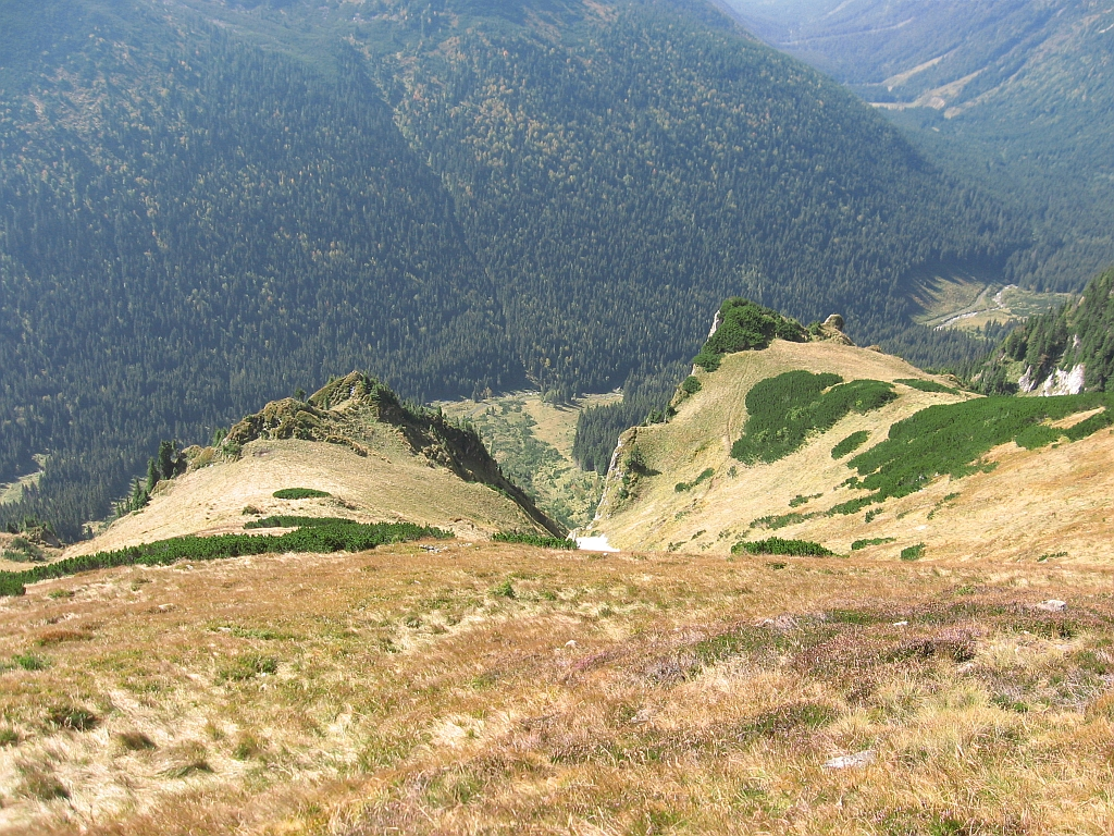 Widok z grani głównej (z okolicy Pośredniego Wierchu Goryczkowego) na Dolinę Cichą. Widoczne Kasine Turnie i Żleb Wrota